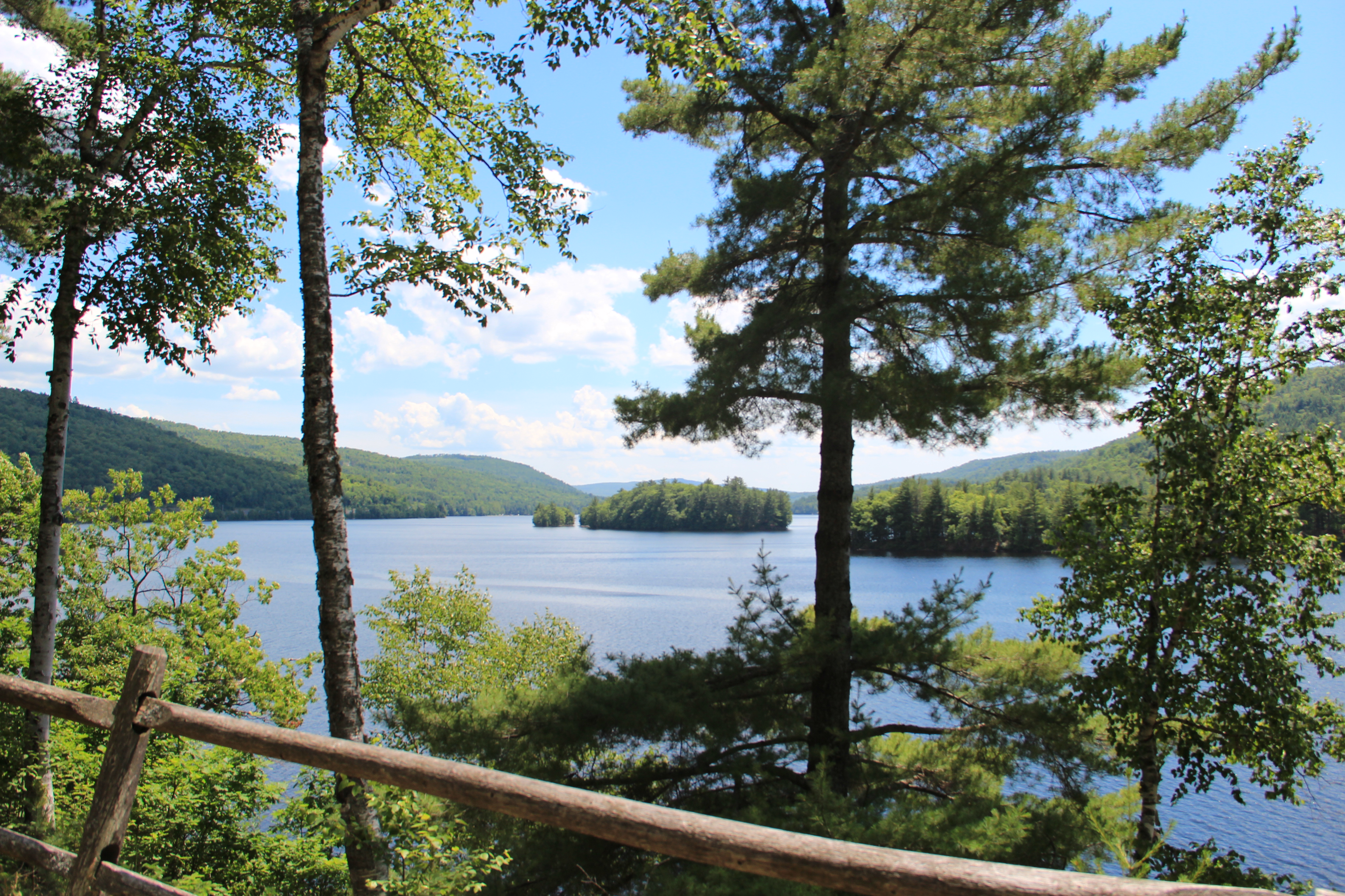 Kennebec River